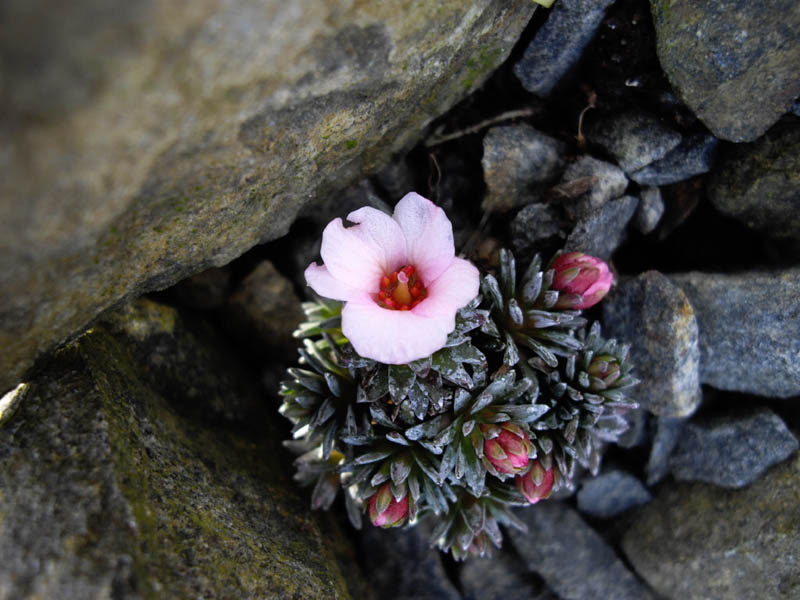 Saxifraga x megaseaeflora 'Karel Čapek'